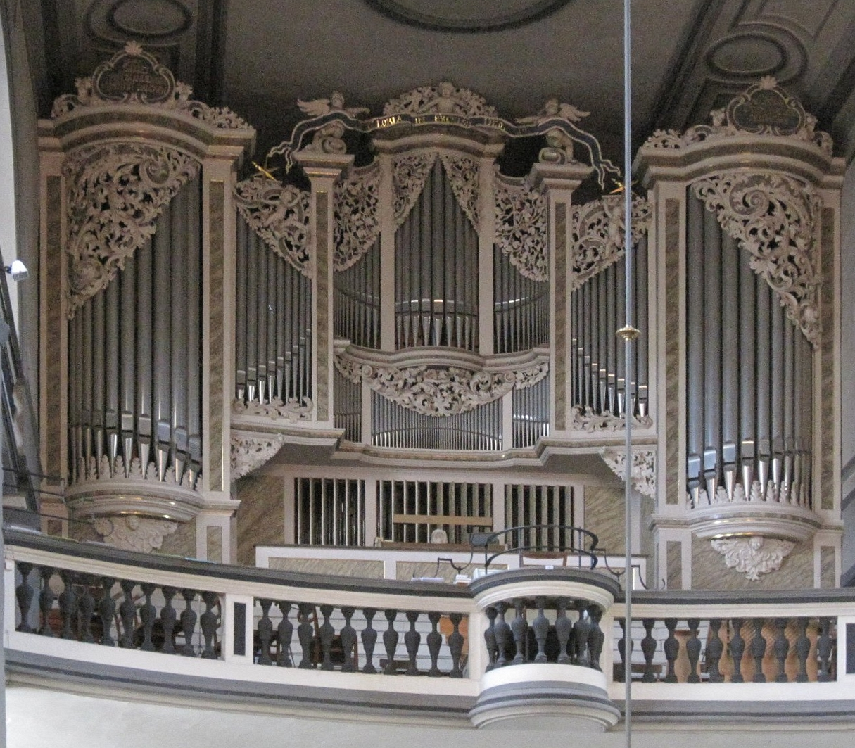 Die Orgel der St. Georgenkirche Eisenach